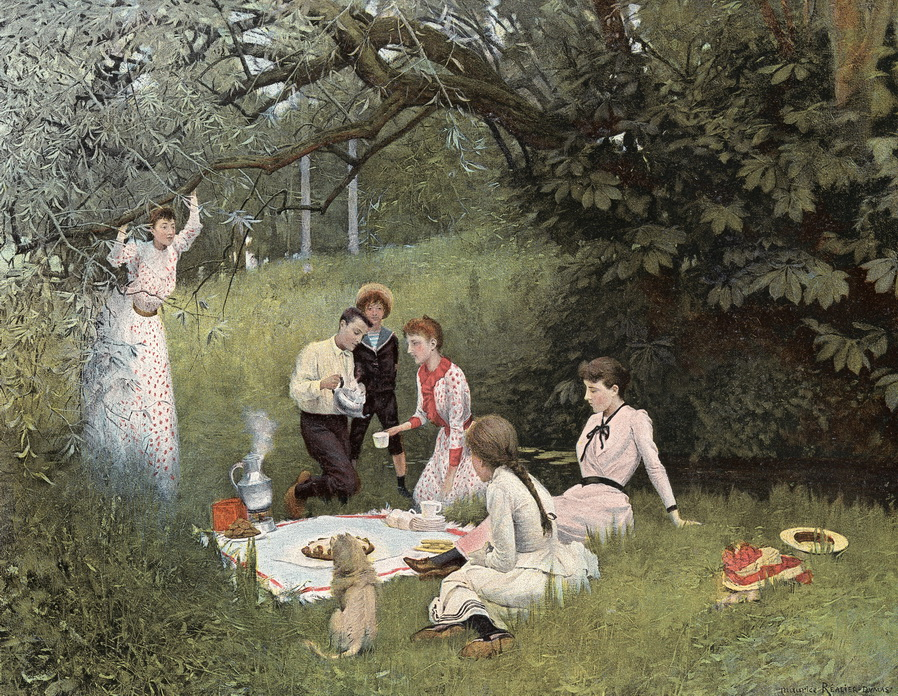 Le goûter sur l'herbe (1892) par Maurice Réalier-Dumas (1860-1928) - Musée de Gajac.